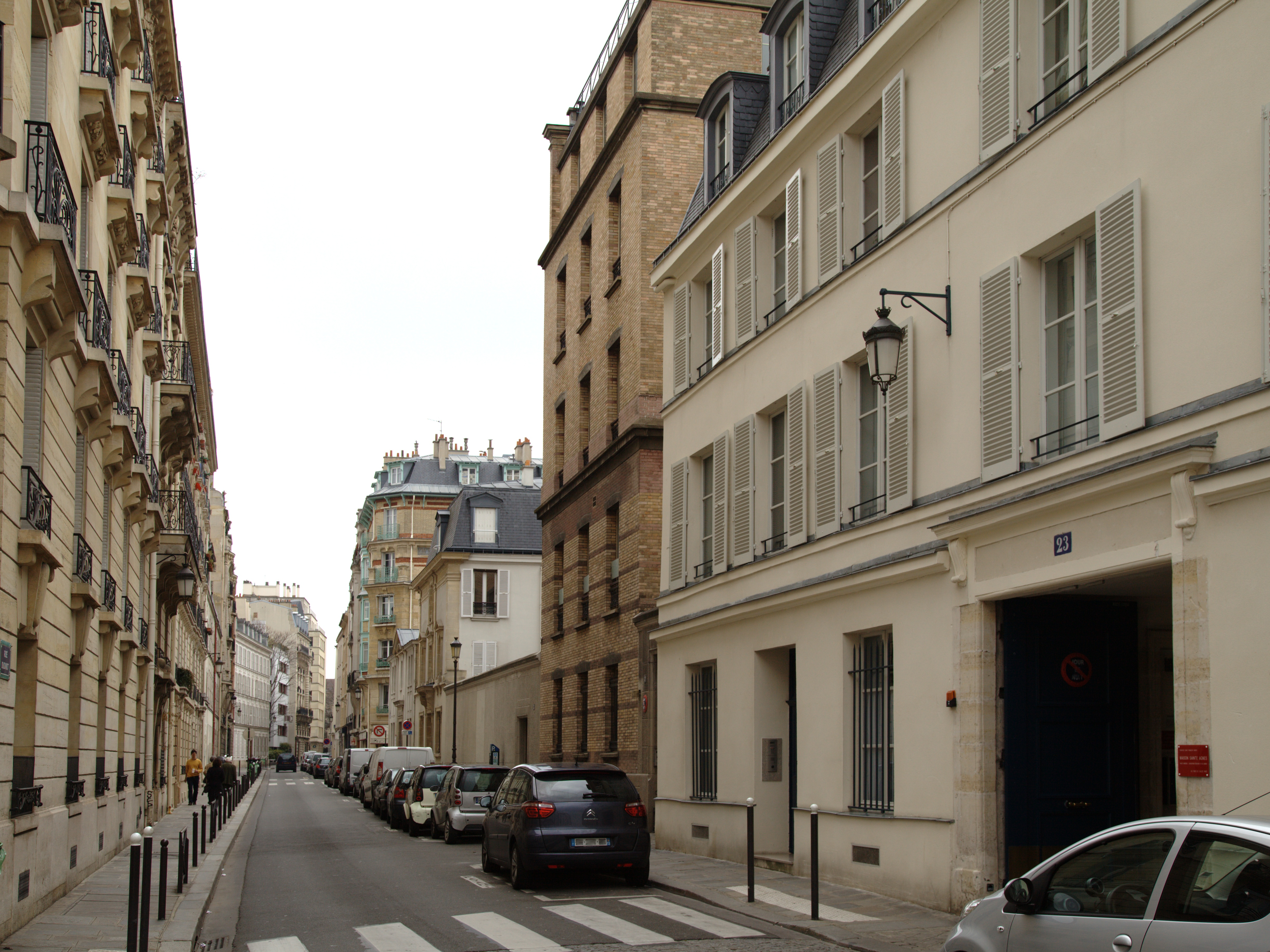 La rue Oudinot à Paris, vue depuis la rue Monsieur en direction est.